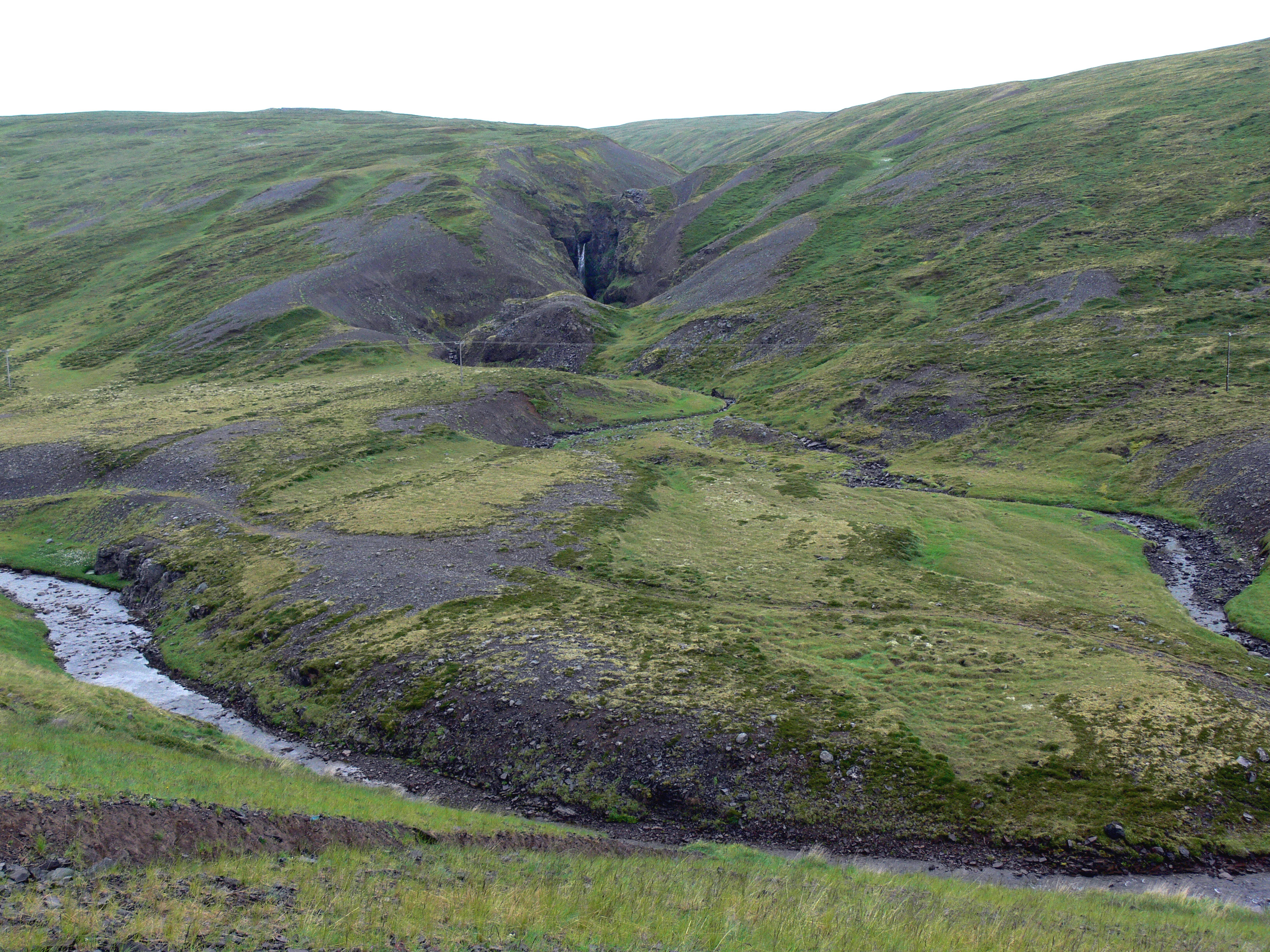 Hafragil in Svinadalur, wo nach der Laxdæla Bolli im Hinterhalt lag und Kjartan erschlug.